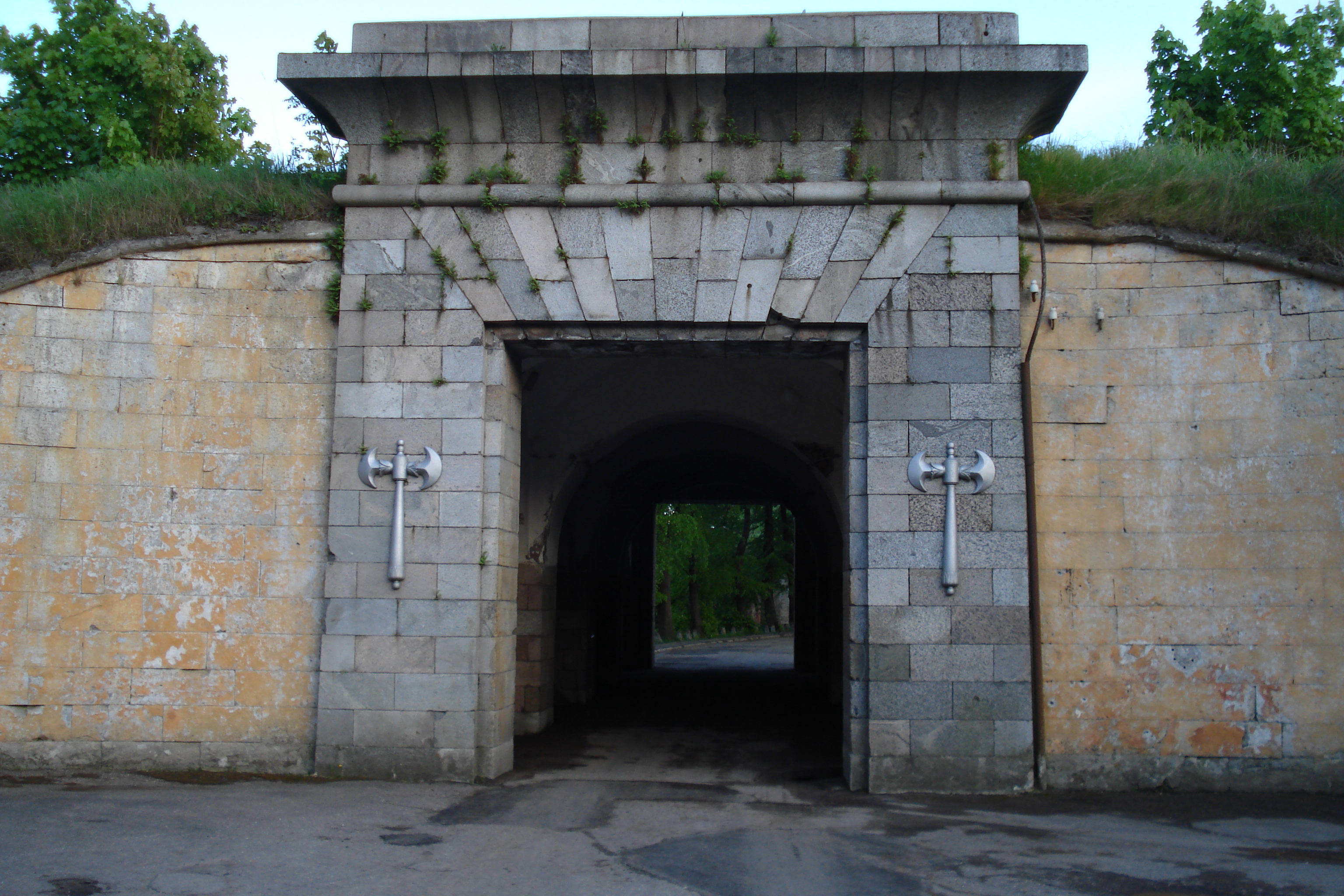 Michael's gates in the Daugavpils fortress. Inside. Михайловские ворота Динабургской крепости. Вид изнутри крепости. Mihaila varti.